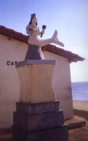 Iemanjá foto que tirei no bairro do Rio Vermelho em Salvador na bahia no Brazil.